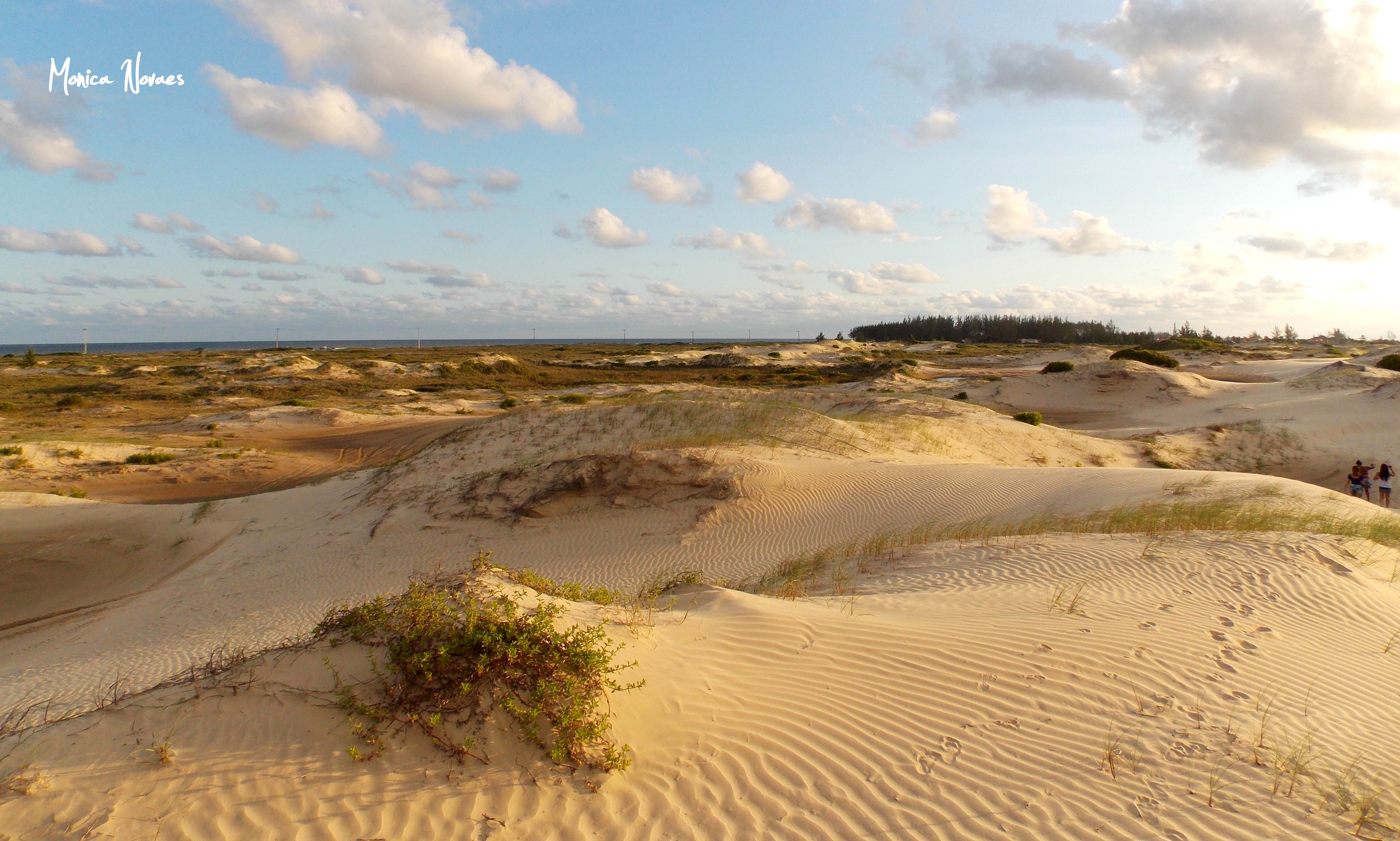 As Dunas do Araçá fazem parte da área de preservação ambiental e são verdadeiros patrimônios naturais de Ilha Comprida/SP.